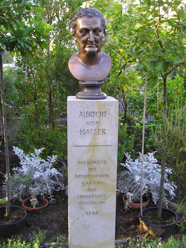 Busto de Albrecht von Haller